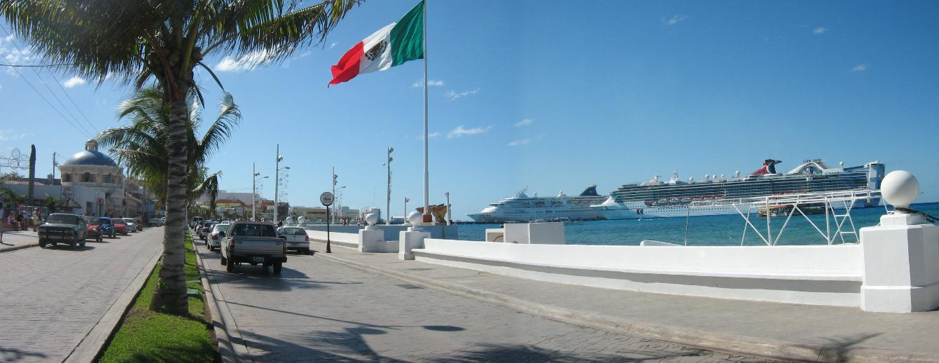 Panoramica del malecon de Cozumel